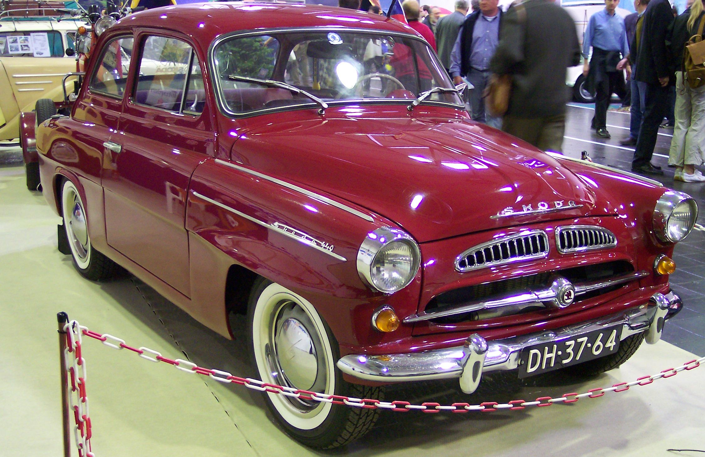 Skoda 440 r